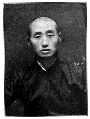 中華民國國會議員